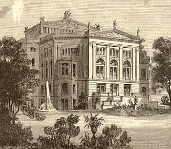 Neues Wallner-Theater Berlin 1864–1945